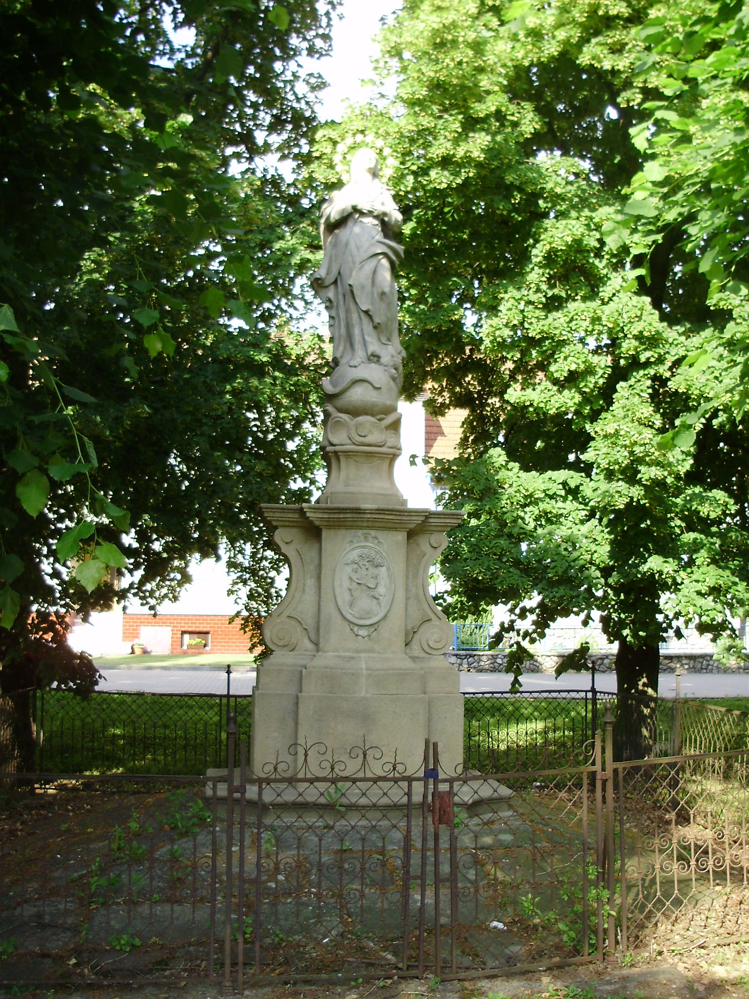 Milotice